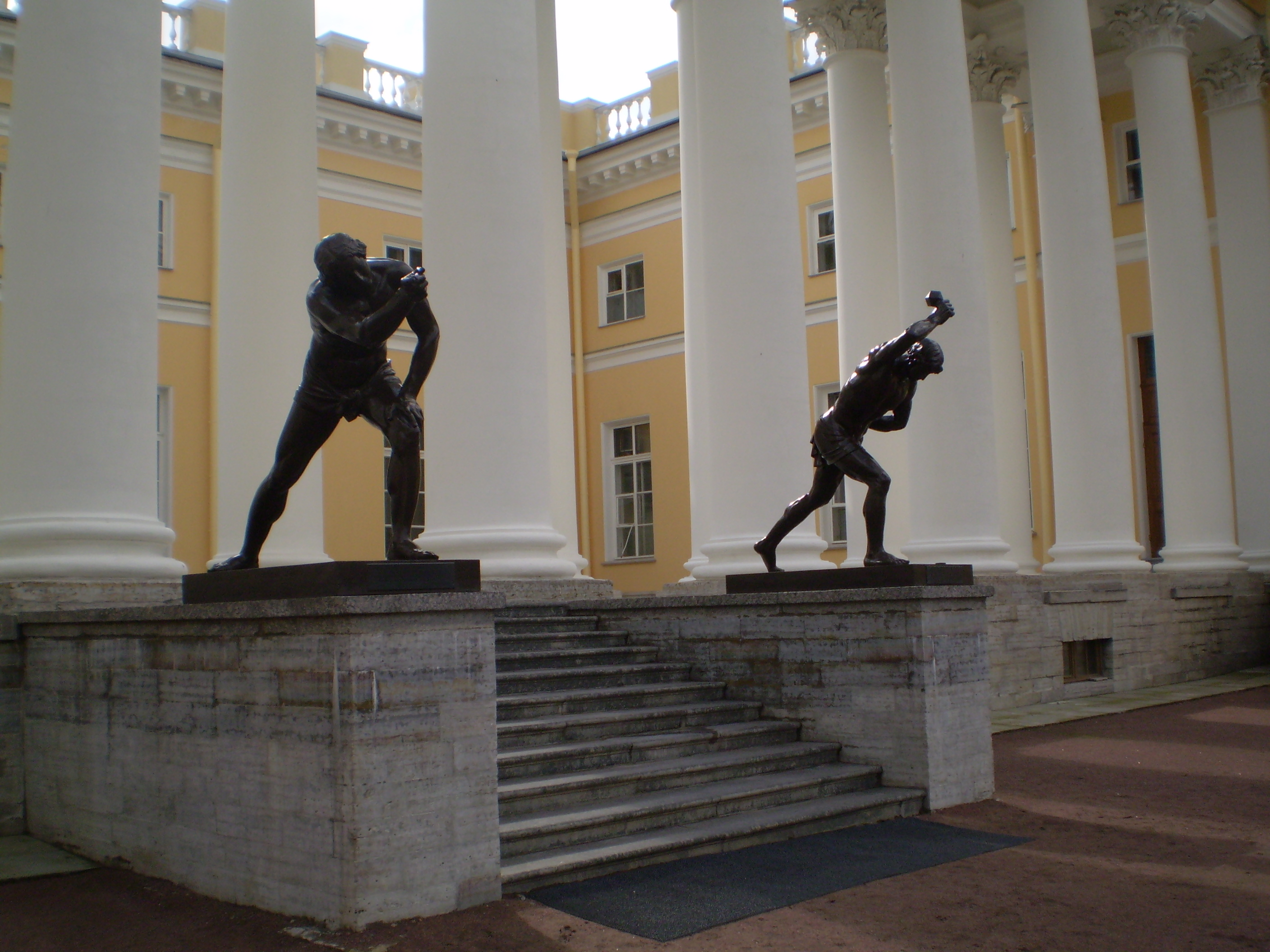 Колоннада Александровского дворца, г. Пушкин, Александровский парк, август 2011года